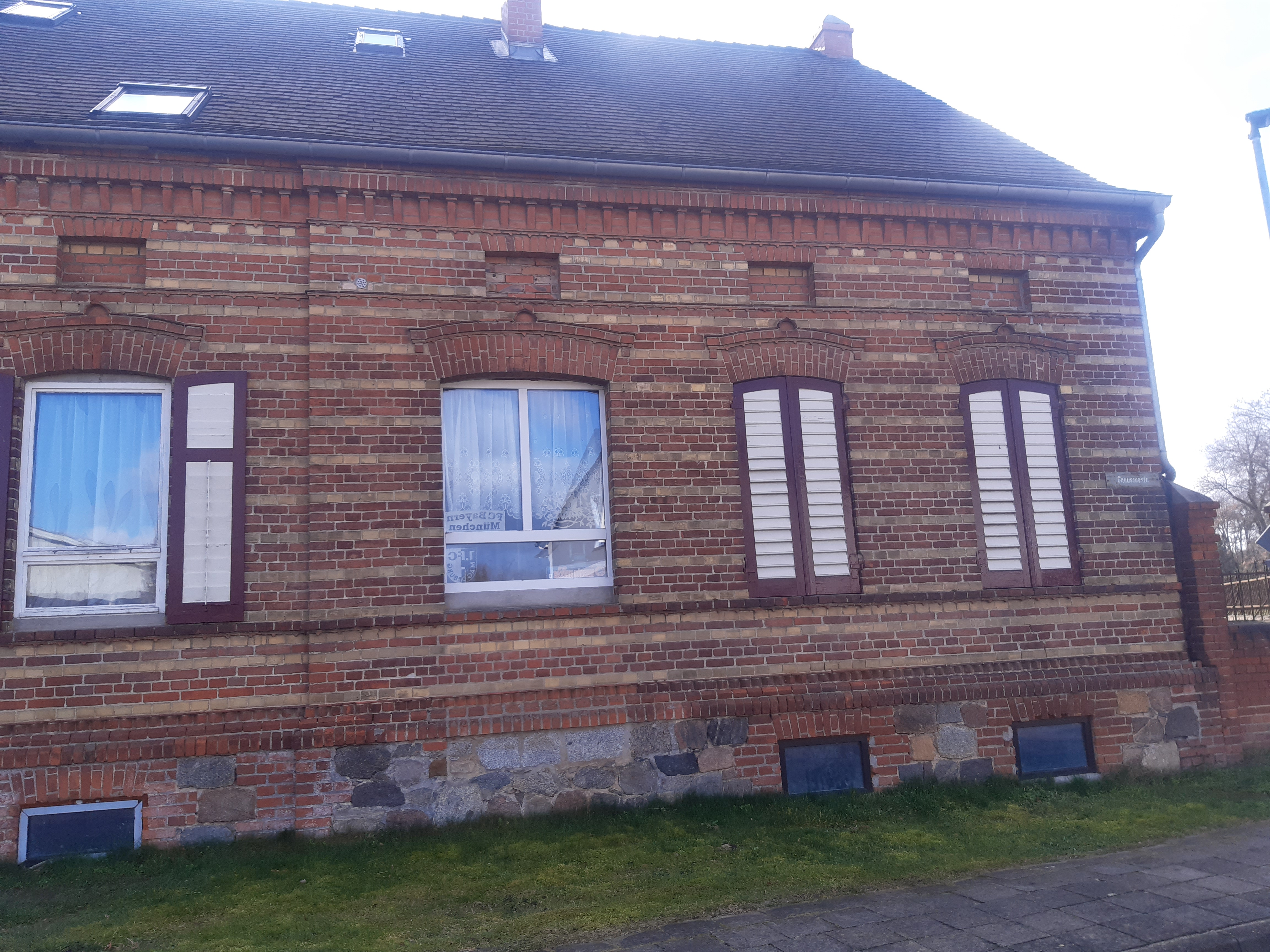 Bauernhaus